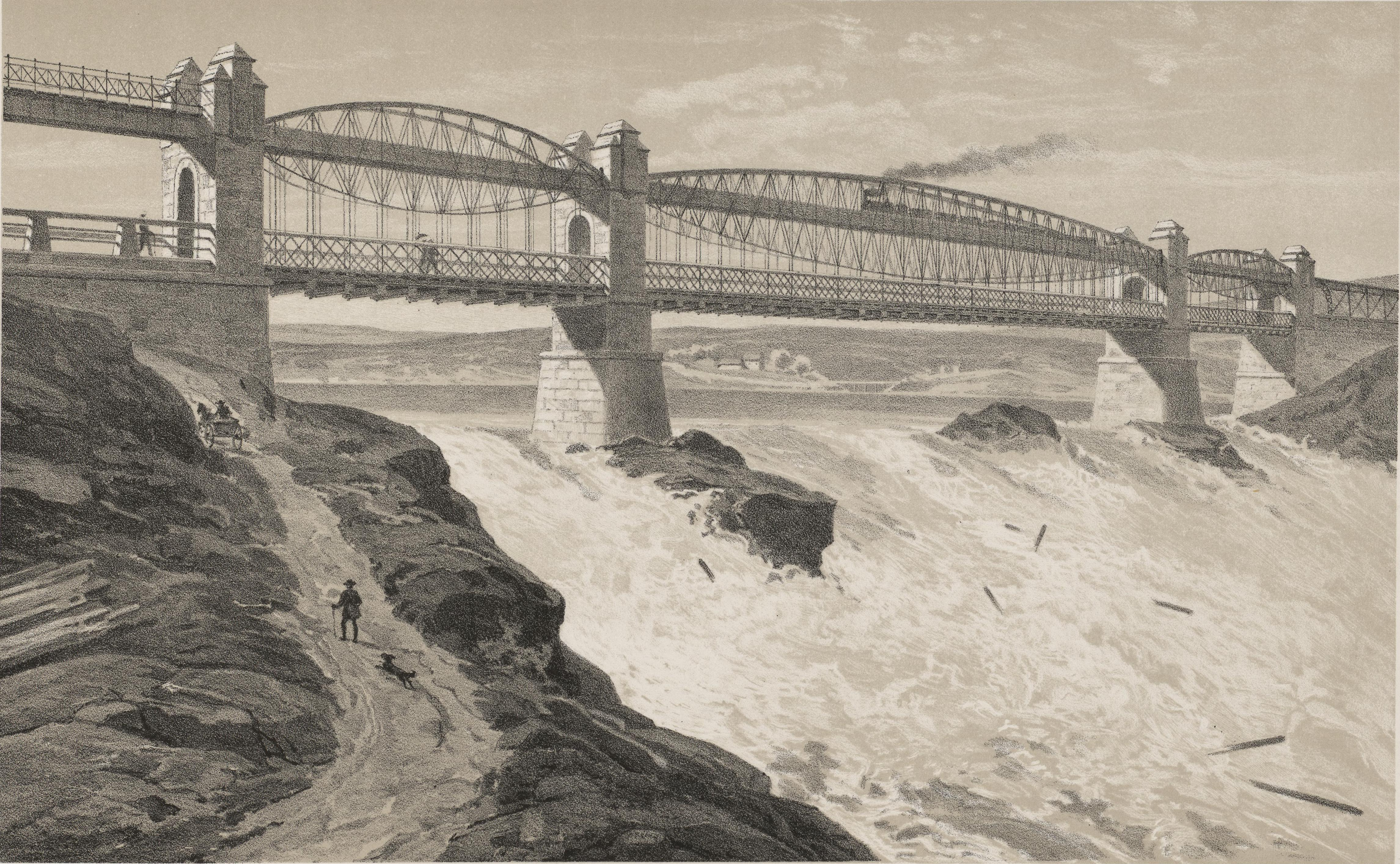 Parti af Sarpsfossen. F. Larsen lith dels efter B. Lund dels efter Fotografi. Illustrasjon hentet fra boken "Norge fremstillet i Tegninger" av ukjent forfatter og utgitt av Chr. Tønsberg (no, 1889)